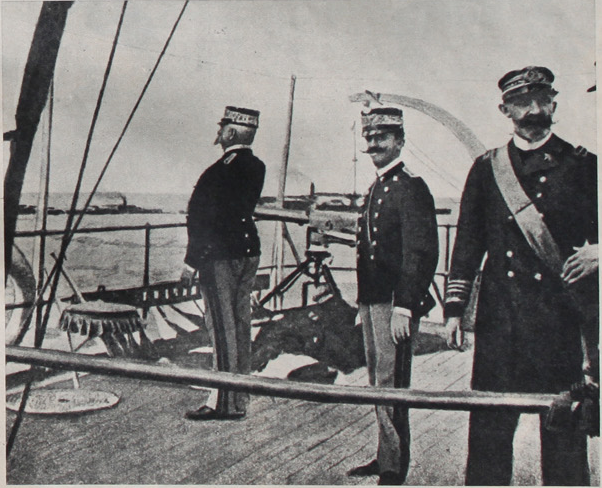 fotografia ritraente il Principe di Napoli un mese prima delle sue auguste nozze a bordo del "Savoia", in occasione delle grandi manovre navali. alla sua destra il Padre Umberto I, e alla sua sinistra lo zio tommaso di Savoia Duca di Genova, direttore delle operazioni